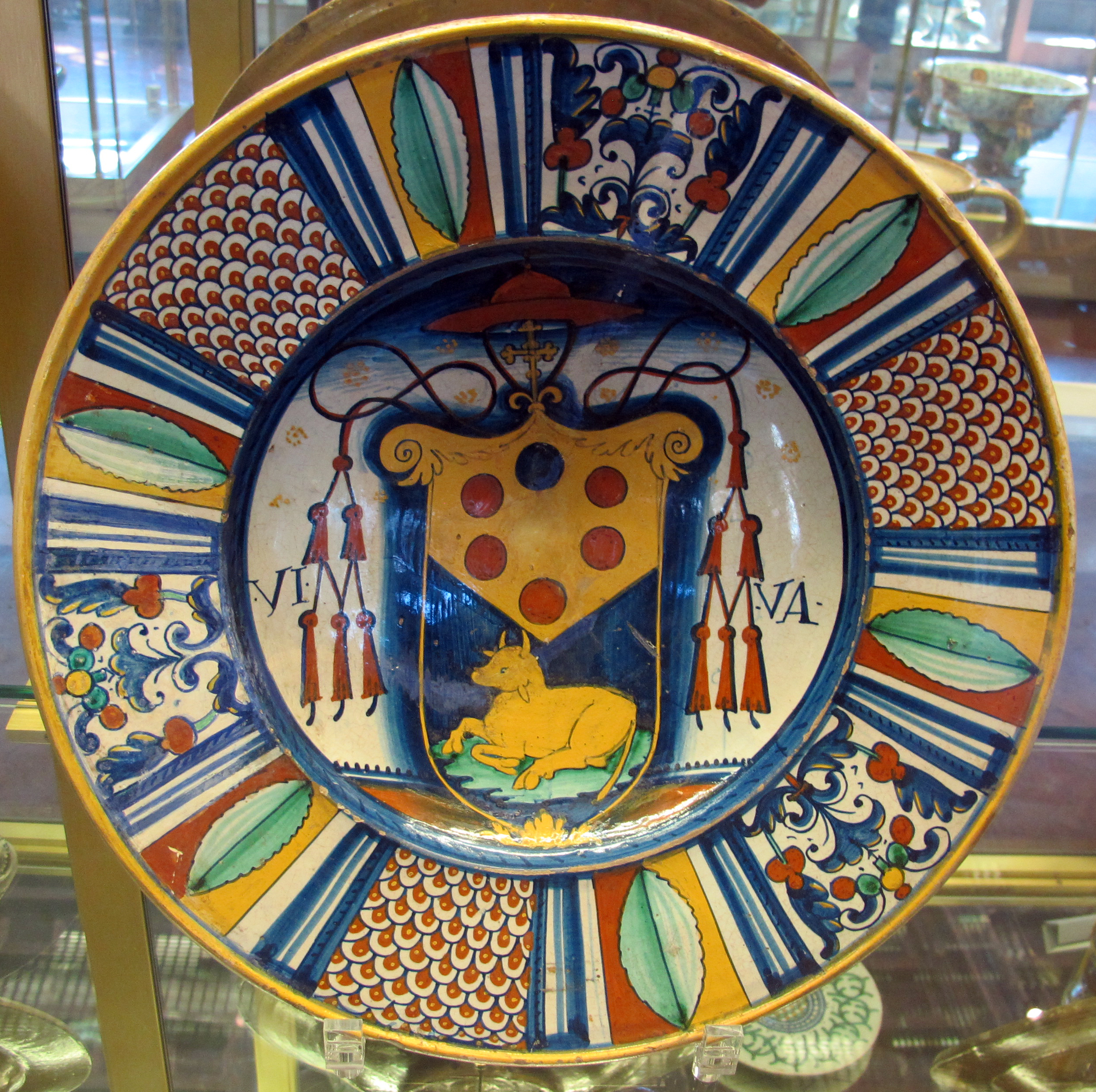 Deruta, piatto con stemma del cardinale silvio passerini, 1517-29 ca.